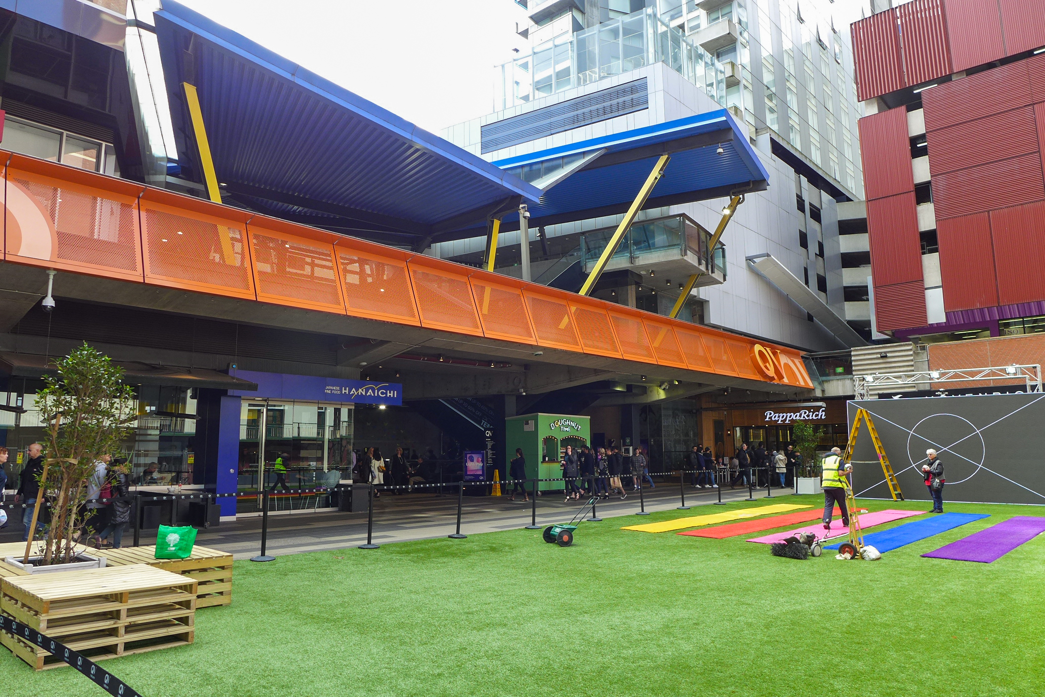 QV Square